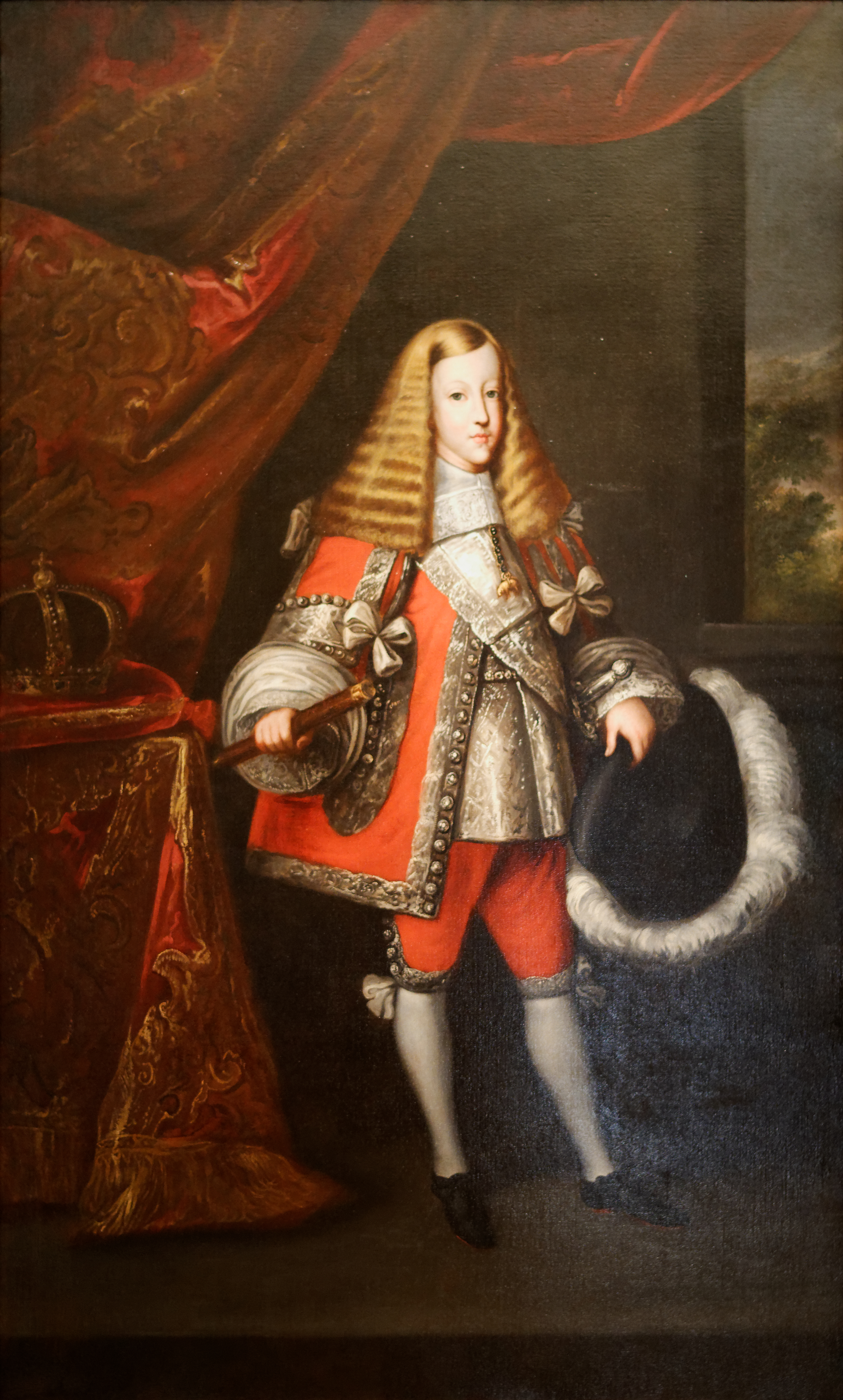 Charles II d'Espagne enfant par Sebastián Herrera Barnuevo (Madrid 1619-1671). Acquis d'emilio Constantini, Florence 1895. Musée des beaux arts de Budapest. Ltsz 1213